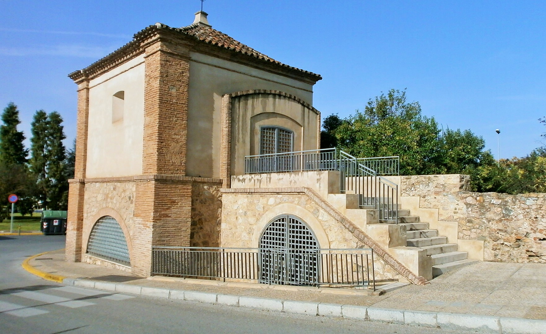 Vista sur-oriental